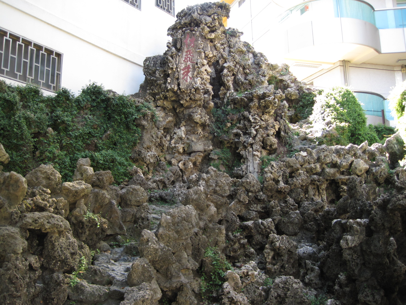 臺南吳園仿飛來峰